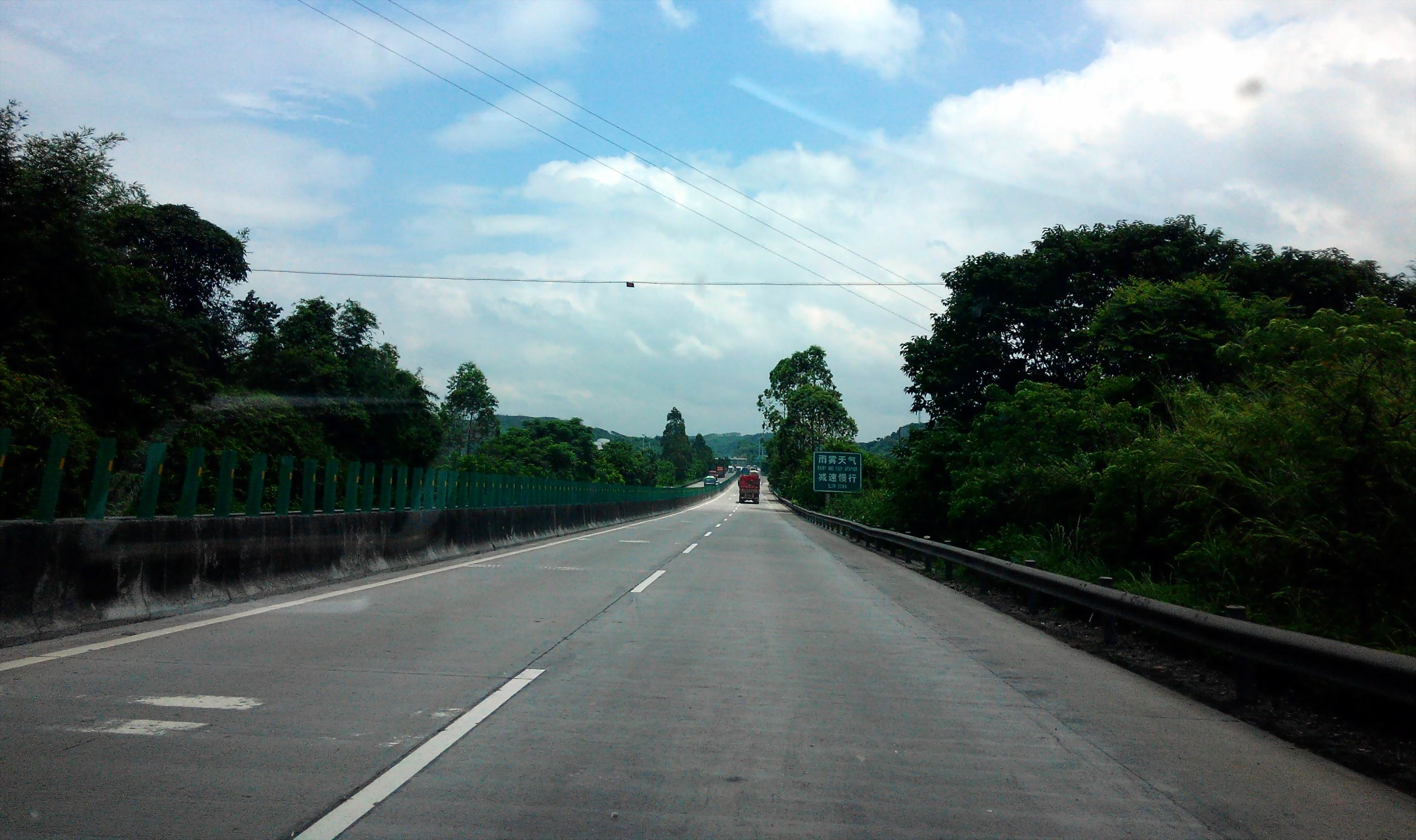 中国高速G4W2（粤高速S110） 连州方向